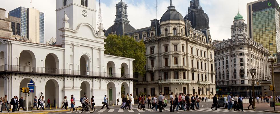 El Cabildo de Buenos Aires